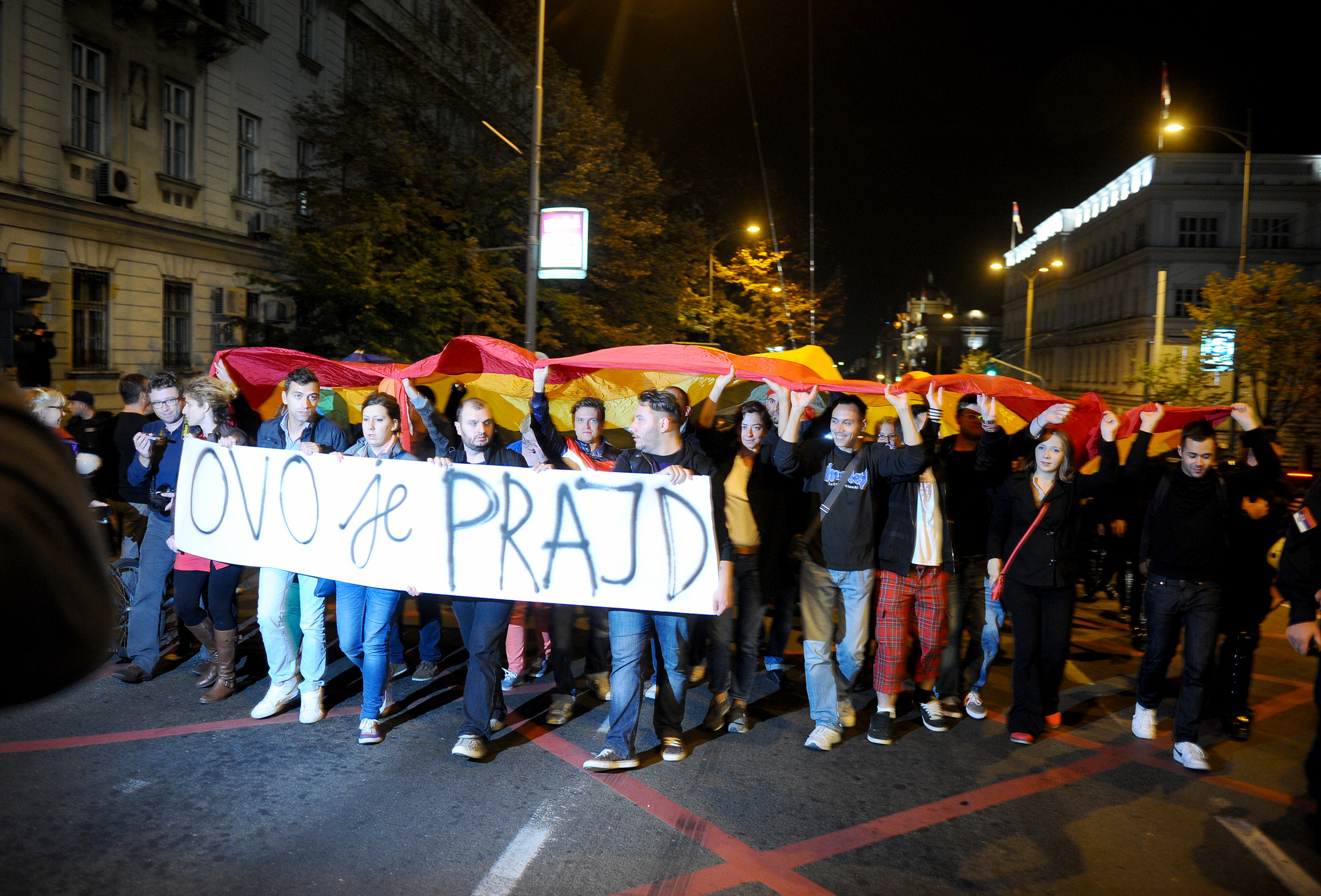 Srpski (latinica): Nakon što su organizatori obavešteni o zabrani Parade ponosa, 2013. godine organizovan je Ponoćni Prajd od zgrade Vlade Srbije do Skupštine Srbije.